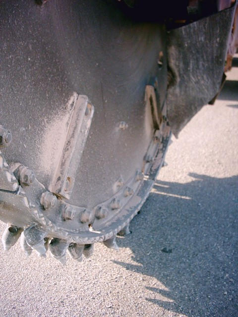 Detall d'una màquina per fer rases. Autor: Plàcid Pérez Bru. totografia feta dins els terrenys comuns de la meva comunitat de propietaris.